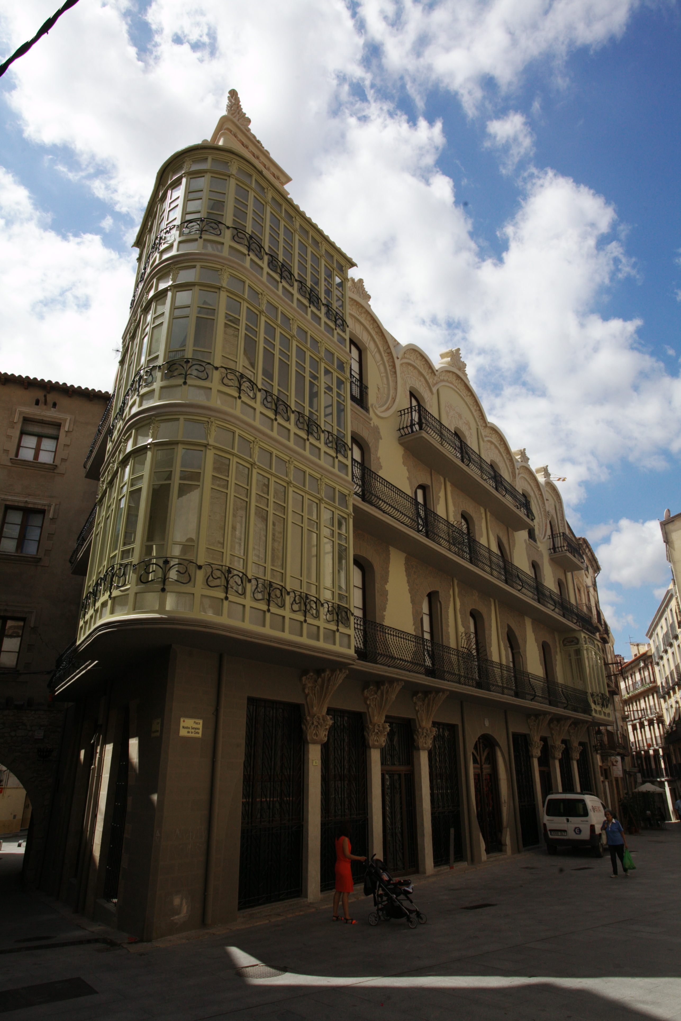 Casa Grego (Tortosa) Object location40° 48′ 48.98″ N, 0° 31′ 21.04″ E